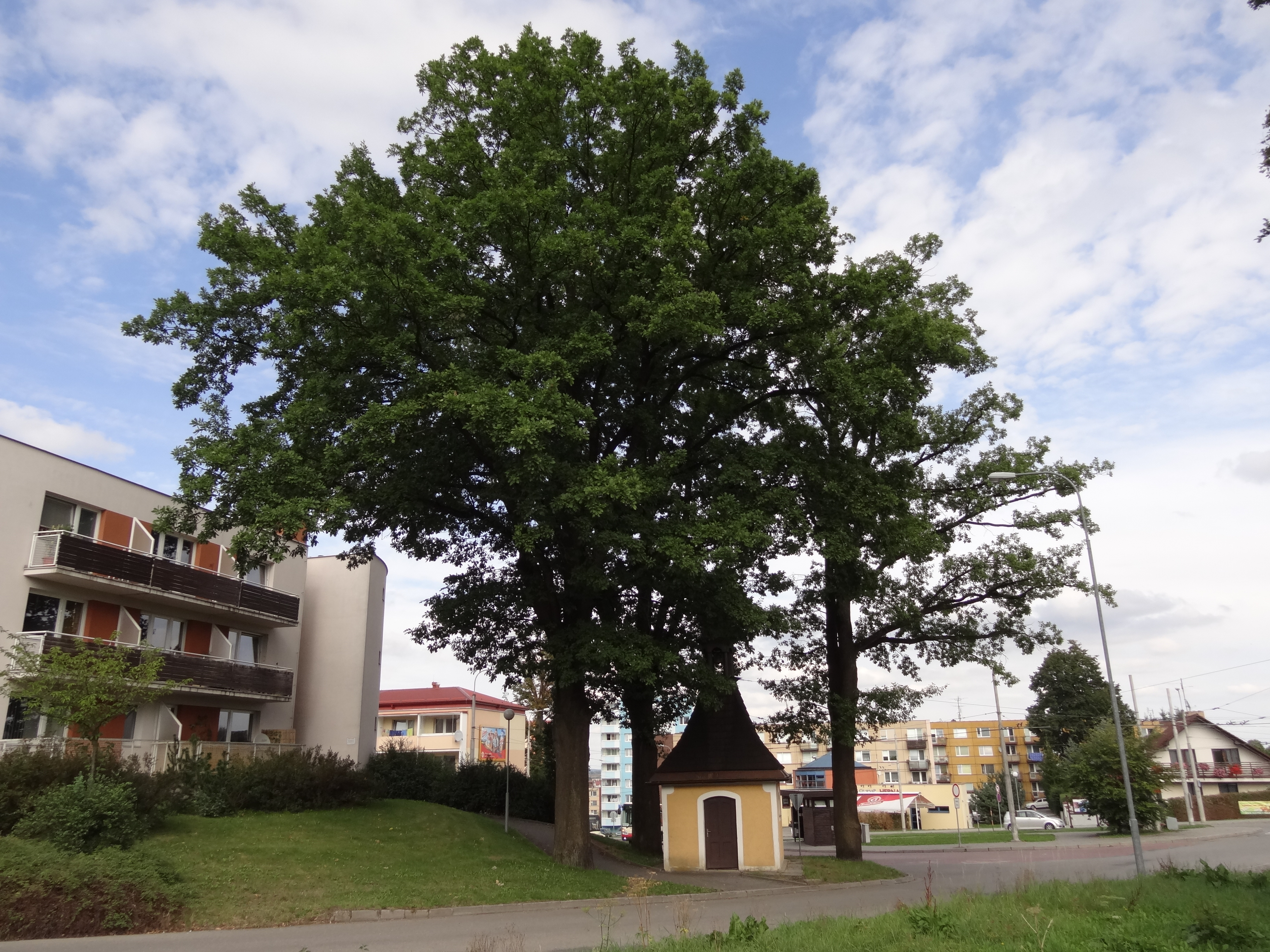 Kaple, náves, Za Poštou, parc. 13, Horní Kosov.